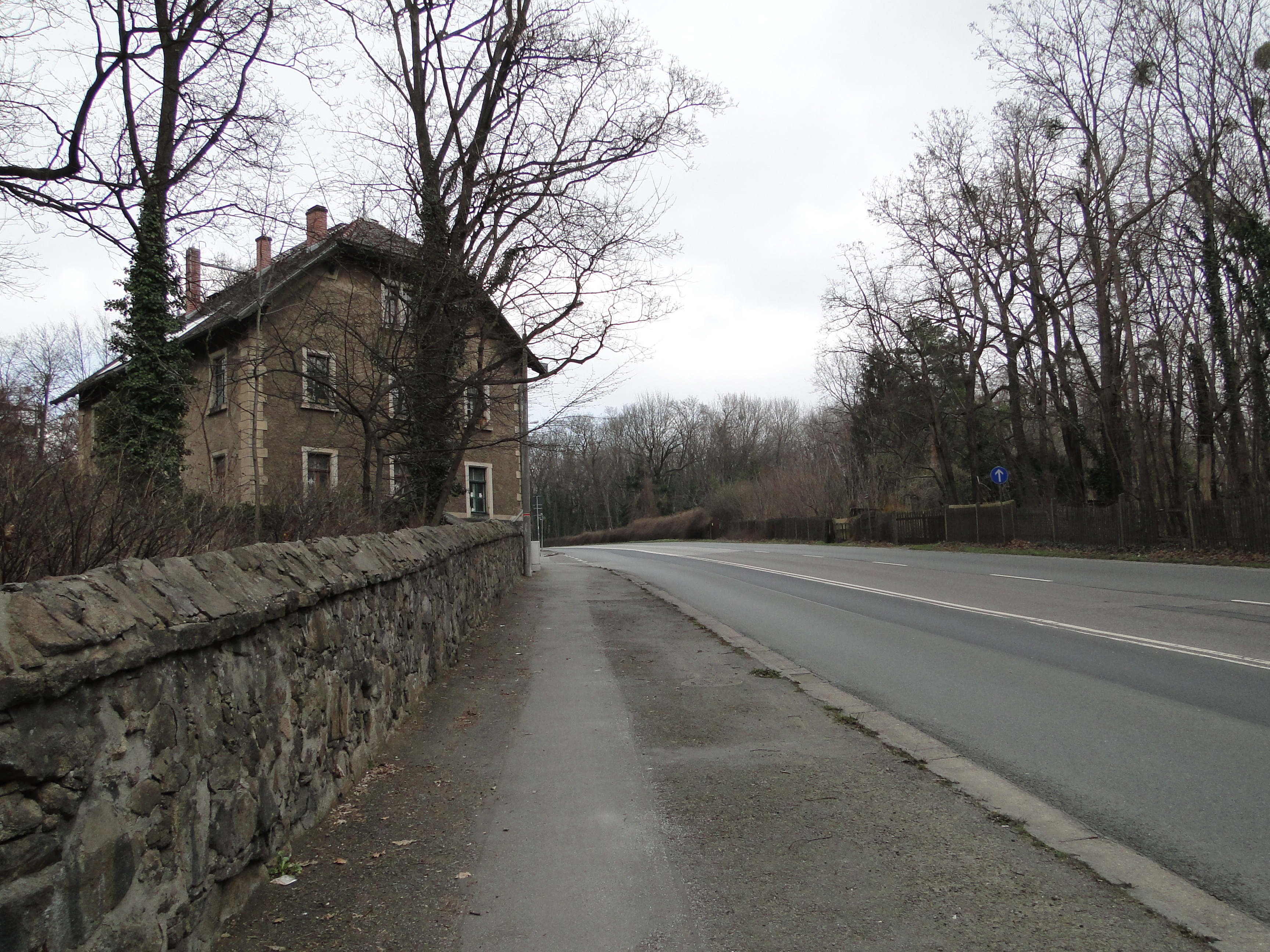 Radeburger Straße Dresden, stadtauswärts kurz nach dem St.-Pauli-Friedhof